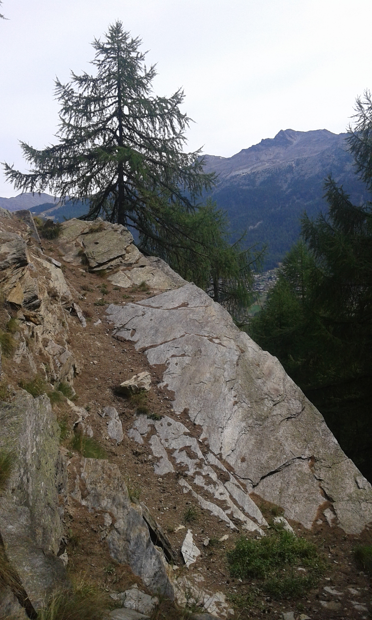 Abbaustelle der Dachplatten oberhalb Lerchji, das auf 1'798 m ü. M. oberhalb St. Niklaus Dorf, Wallis, Schweiz, liegt.